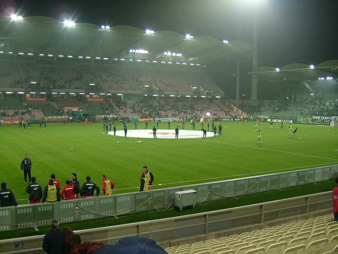 Rapid Wien - Grazer AK starting at Gerhard-Hanappi-Stadion in Wien (October 2005).